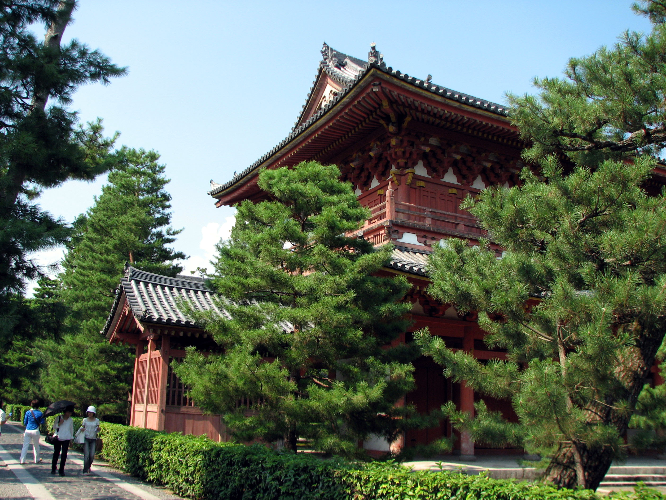 The Daitoku-ji